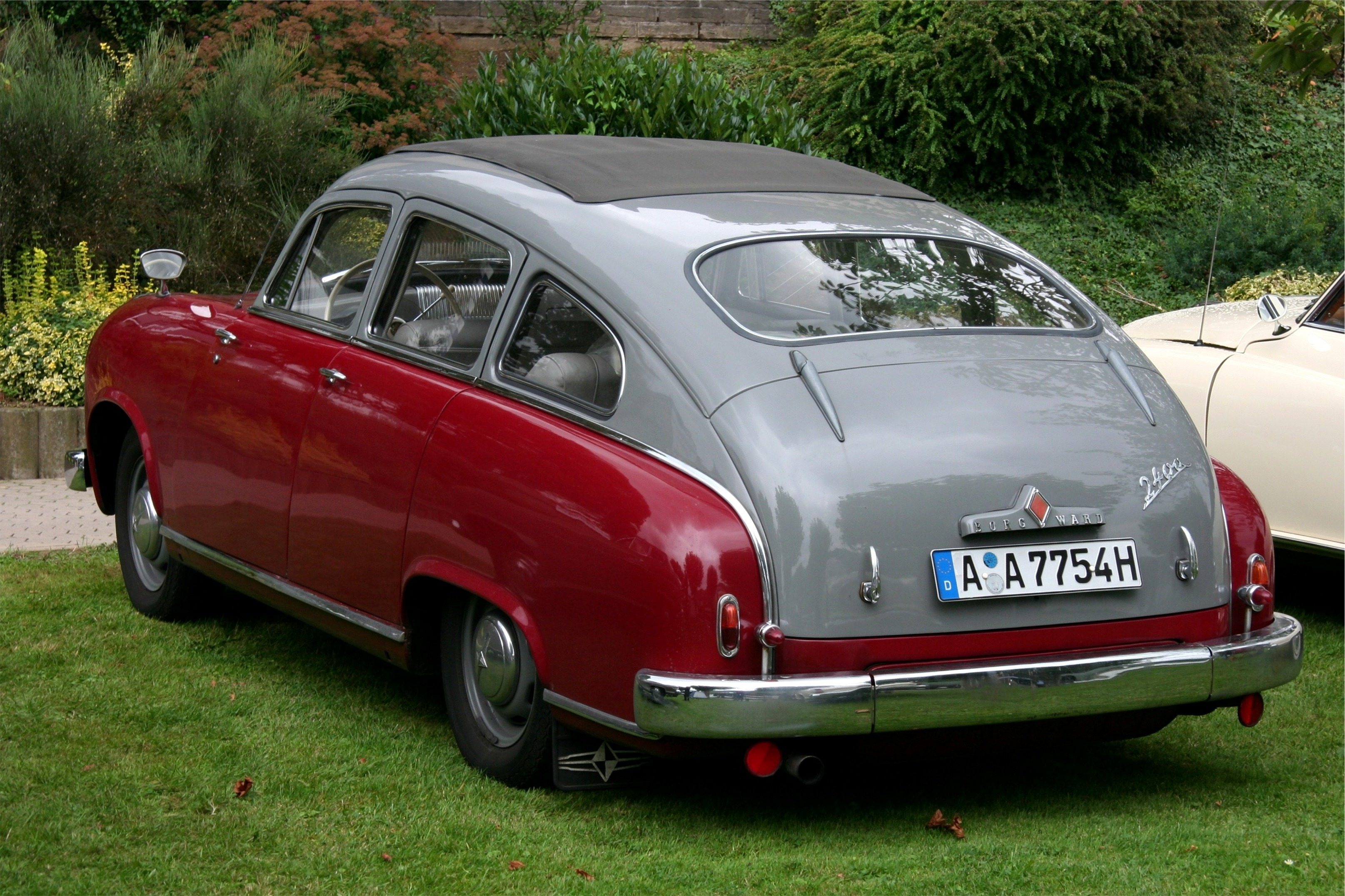 Bildbeschreibung: Borgward Hansa 2400 (1952—1955) Fotograf: Lothar Spurzem Datum: 08.09.2007 beim Borgwardtreffen in Andernach Sonstiges: Kennzeichen verändert